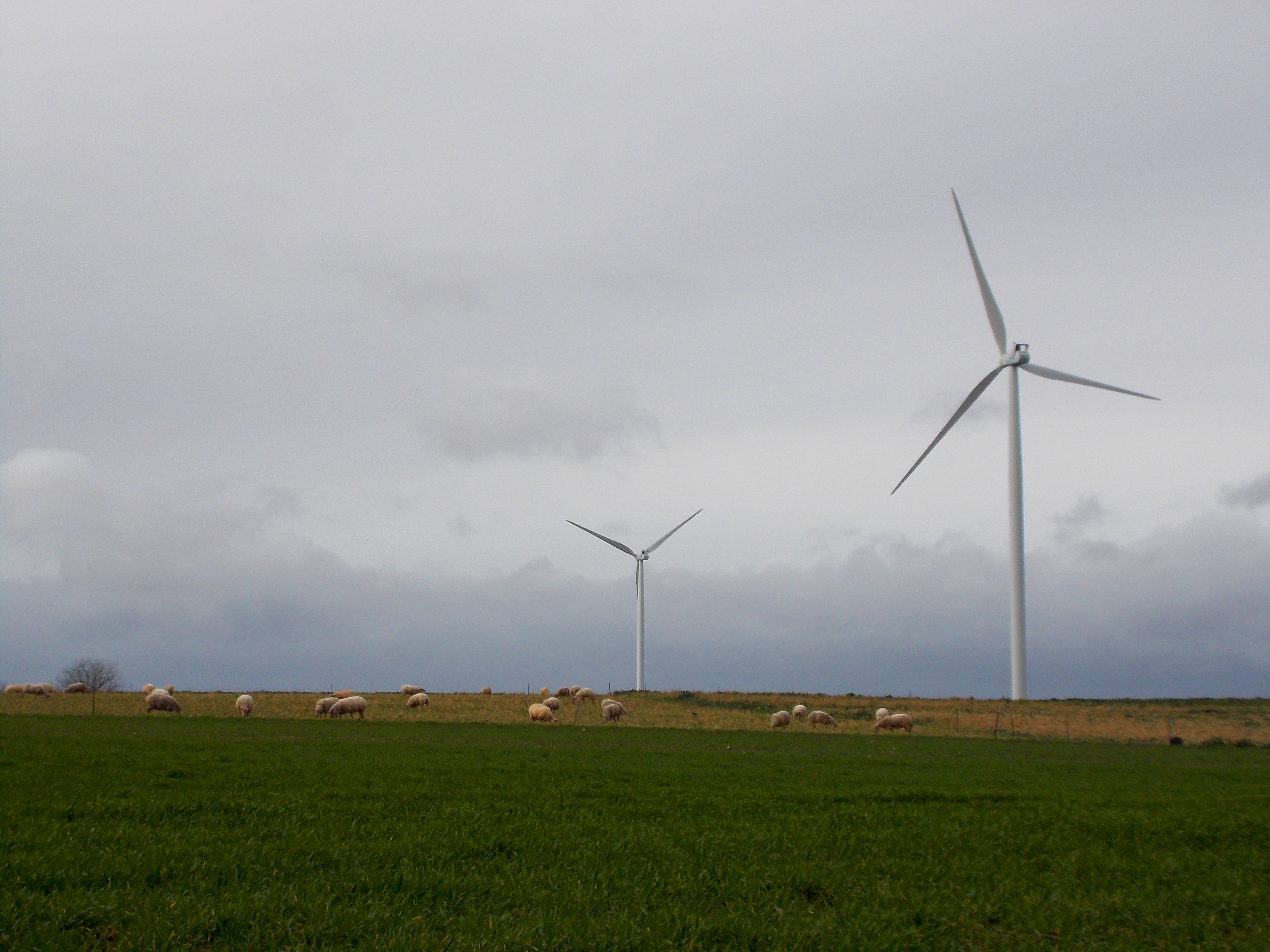 Eoliennes et moutons à Lizant